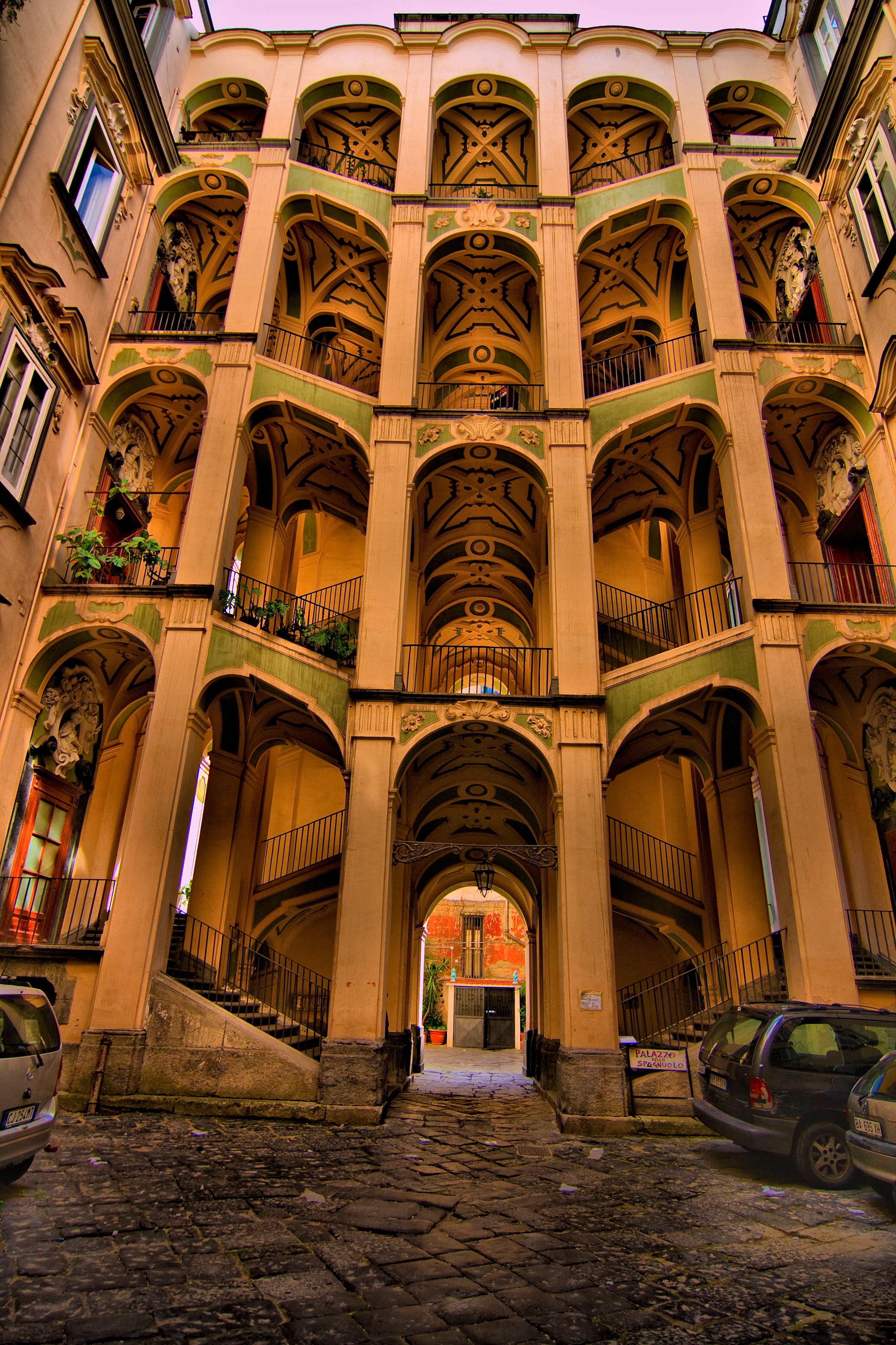 Il Palazzo dello Spagnolo, un palazzo monumentale di Napoli, ubicato in via Vergini nel rione Sanità, in pieno centro storico cittadino.